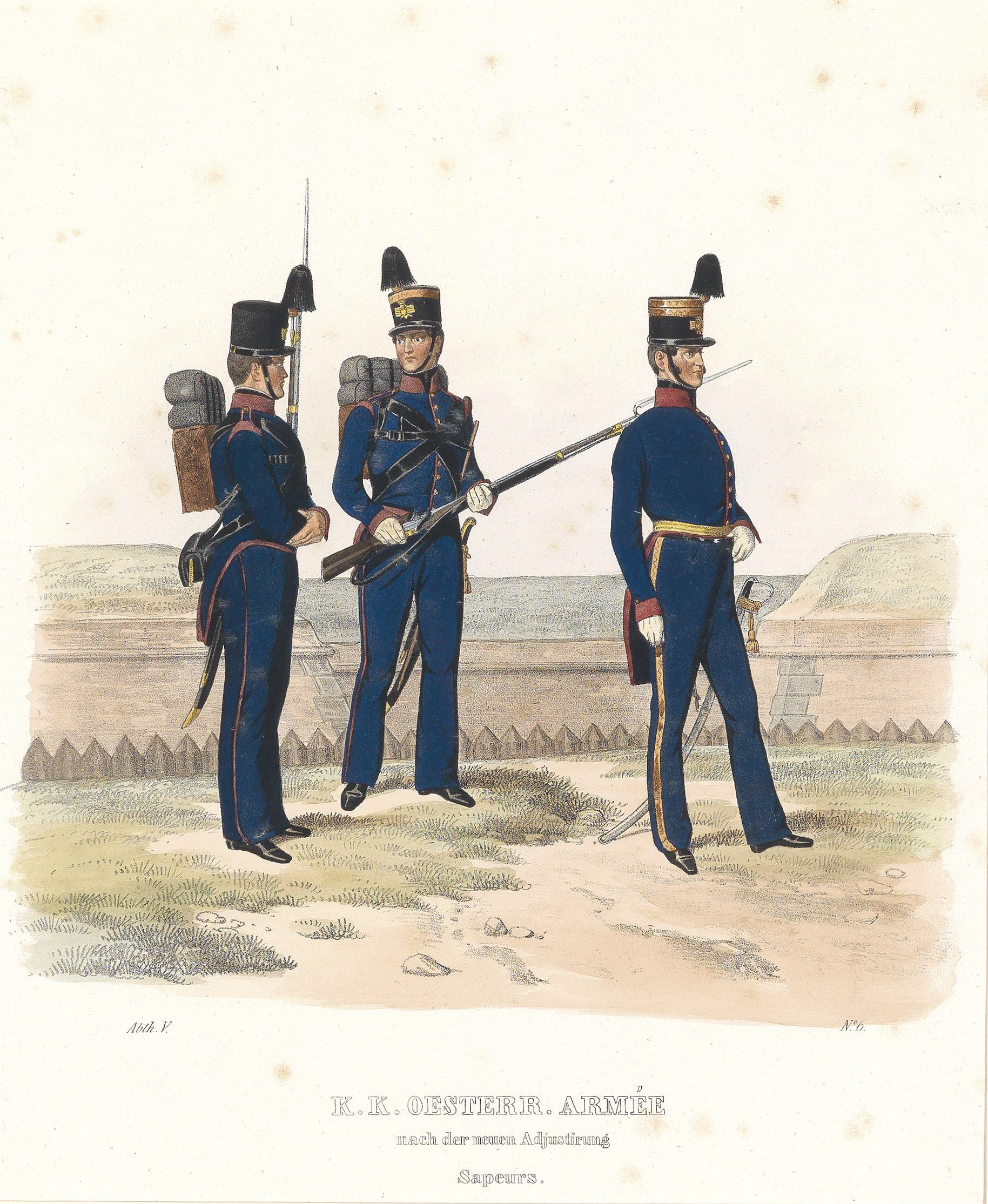 Blatt aus dem Uniform-Tafelwerk K. K. Oesterreichische Armee nach der neuen Adjustierung in VI Abtheilungen, erschienen 1837 bei M. Trentsenskː 35x29 cm, Blatt Nr. 6: Gemeiner, Korporal und Feldwebel (v.l.n.r.) des Sappeur-Korps in Paradeadjustierung.